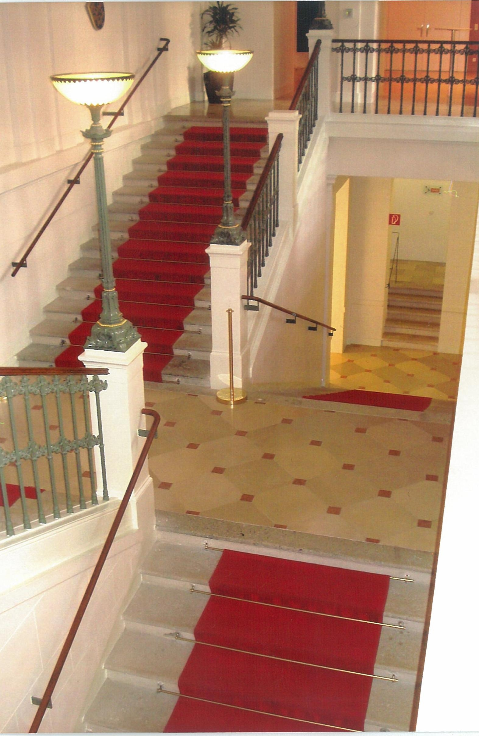 Palais_Niederösterreich5